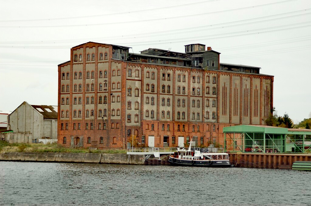 Ehemalige Ölmühle am Ufer der Trave in Lübeck-Siems, erbaut 1905